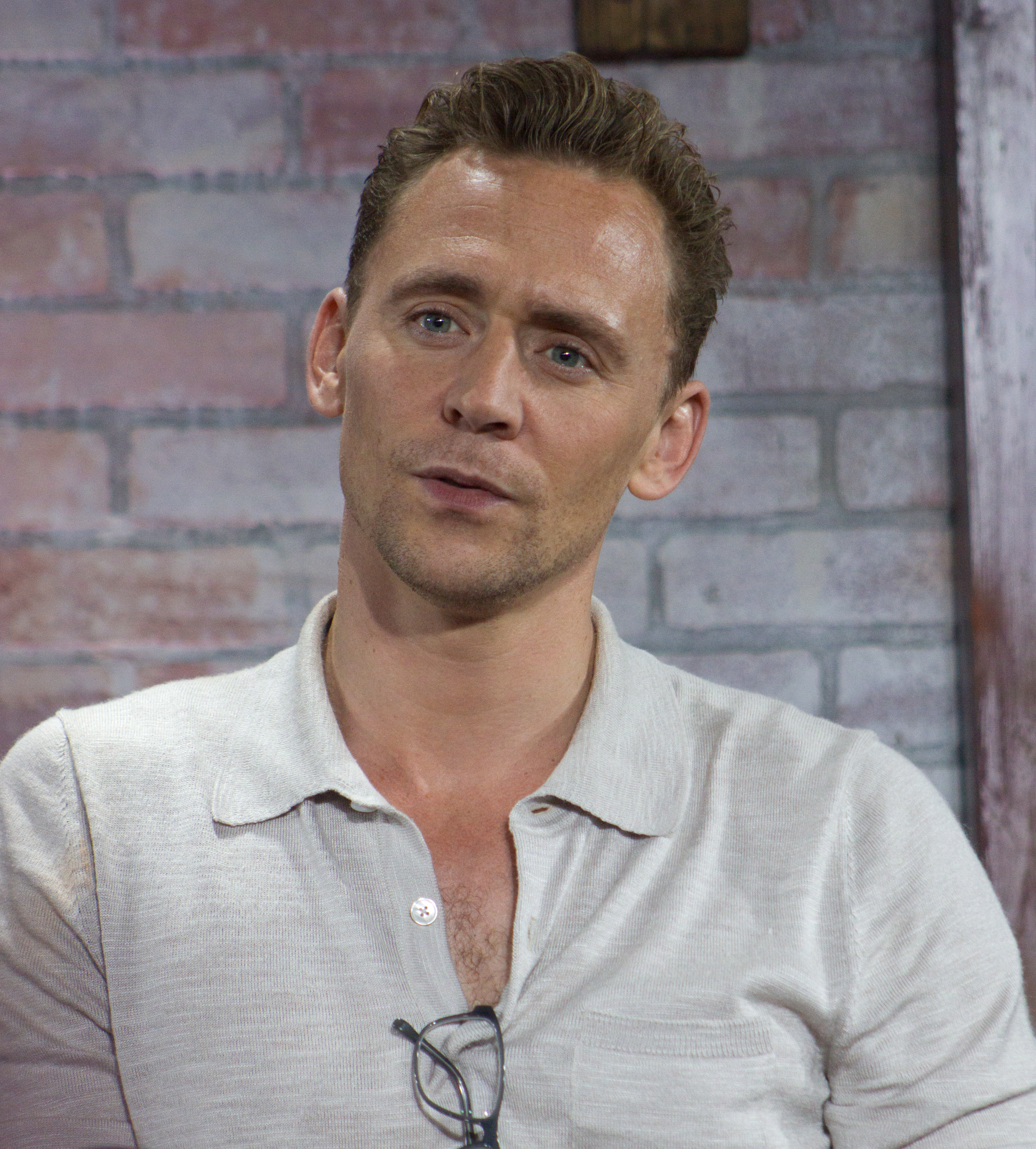 Tom Hiddleston